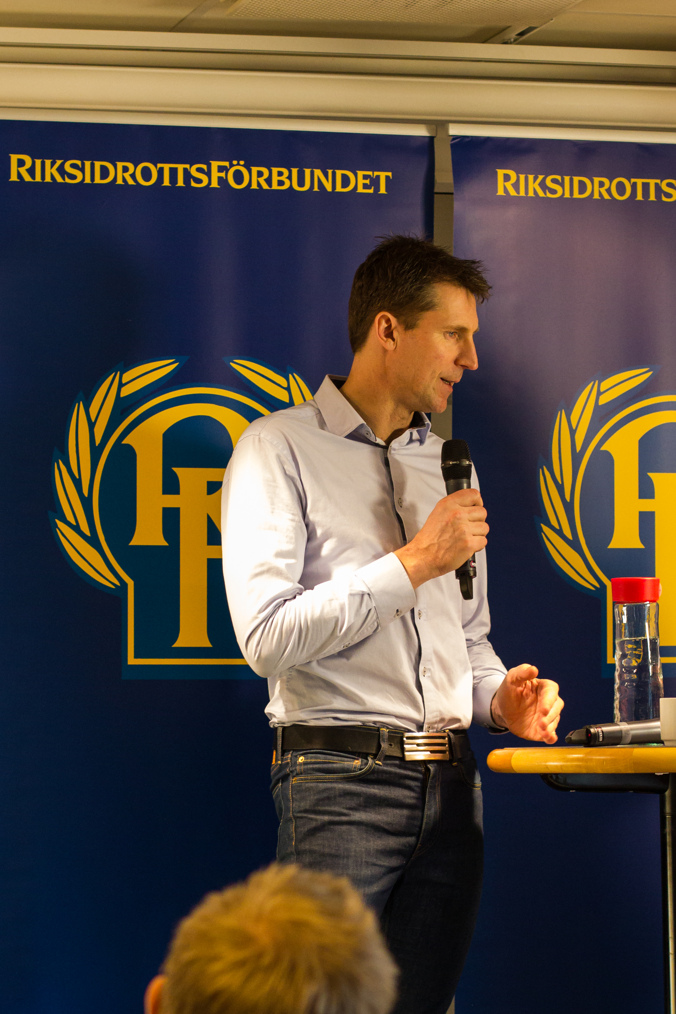 Rallyföraren Hasse Gustavsson intervjuad av Gunilla Wikström på SM-veckan 2013:s presskonferens.